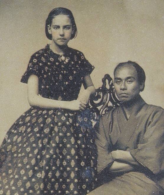 福沢諭吉。Fukuzawa Yukichi.諭吉が渡米した時に、サンフランシスコにあったウィリアム・シュー写真館で撮影された写真。彩色された湿板写真。写真のタイトルは「写真館の少女とともに」